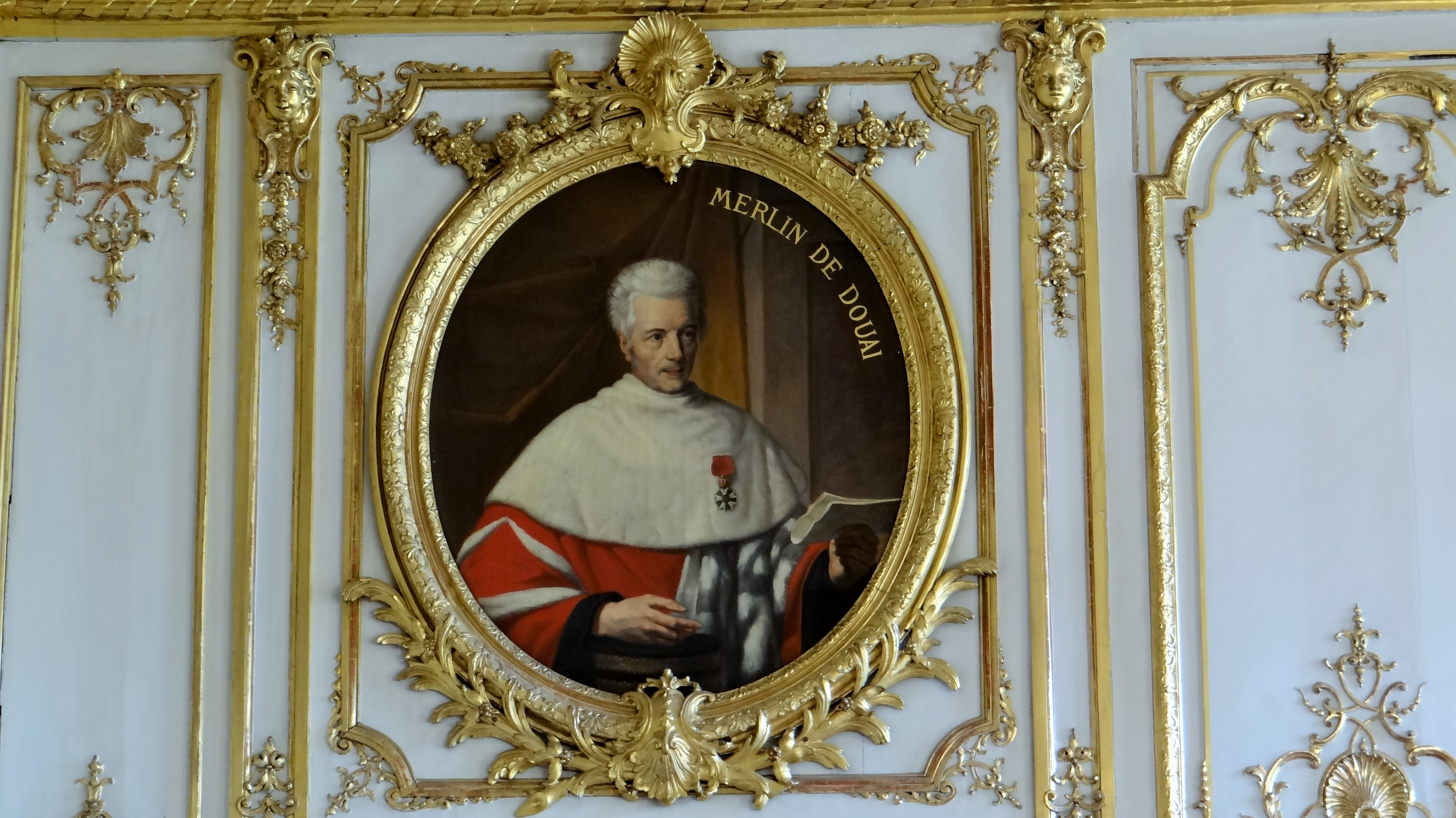 Hôtel de Bourvallais, Salon des Portraits This building is en partie classé, en partie inscrit au titre des Monuments Historiques. .